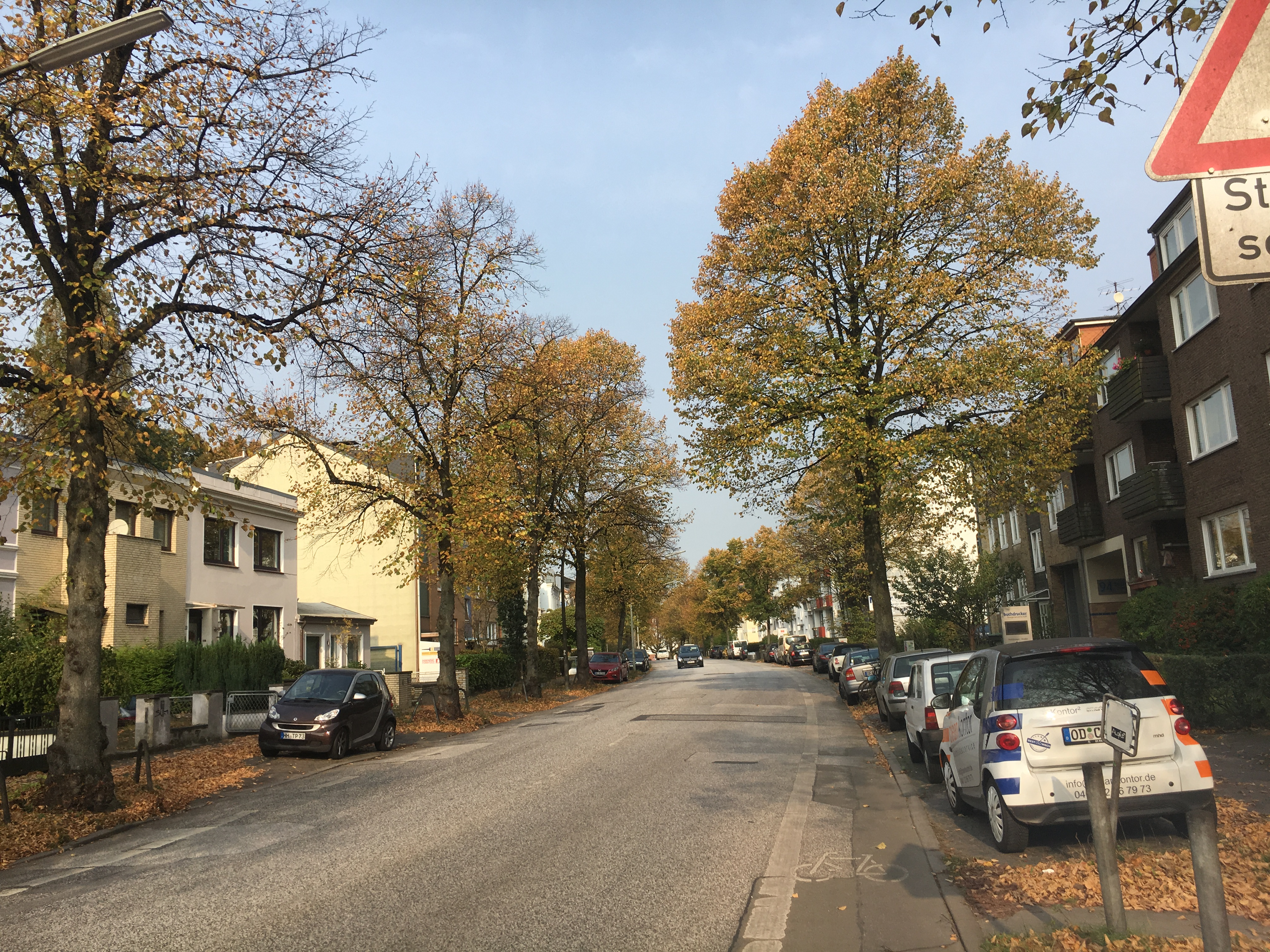 Steilshooper Straße, Blick von der Einmündung der Wachtelstraße in Richtung Hellbrookstraße